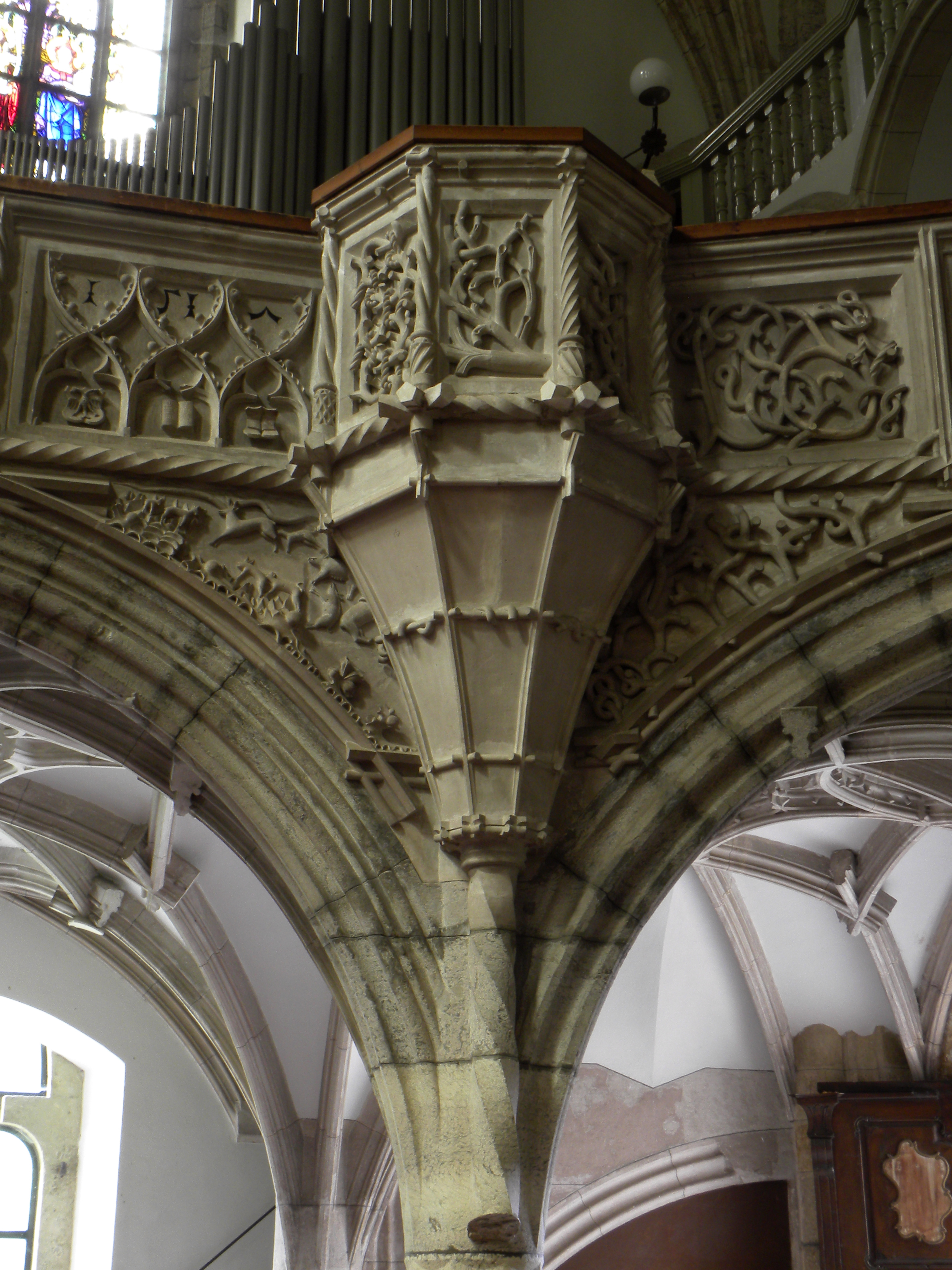 Kirchenfestungsanlage hl. Oswald - Detail der Empore mit der rechten Kanzel. Die darin befindliche Jahreszahl meint, lt. neuesten Untersuchungen, nicht das Entstehungsjahr der Empore sondern den Beginn der Reformation.